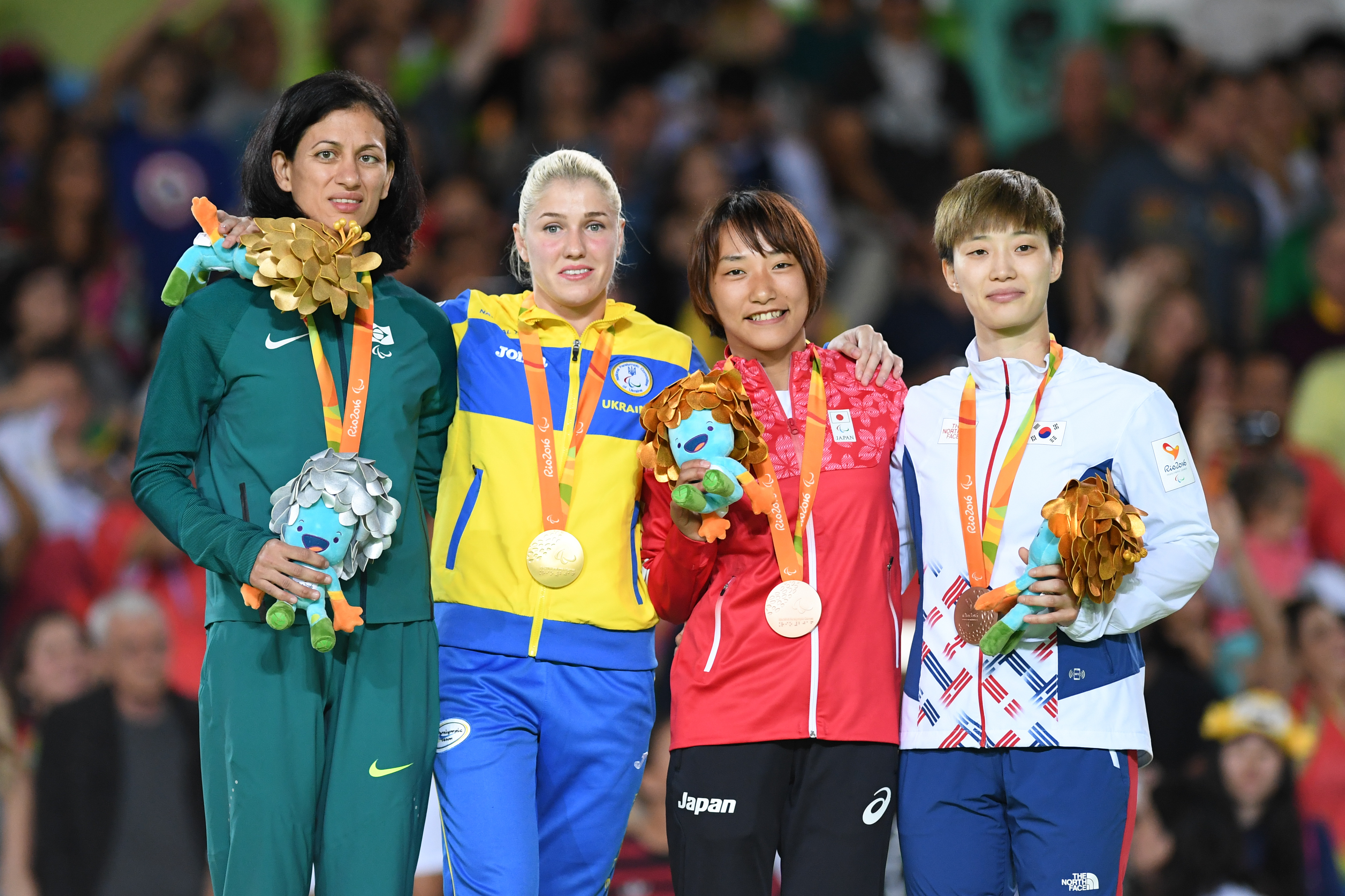 Rio de Janeiro - A brasileira Lucia Araújo perde para a ucraniana Inna Cherniak na final do judô feminino 57kg e fica com a medalha de prata na Paralímpiada Rio 2016 (Tânia Rêgo/Agência Brasil)